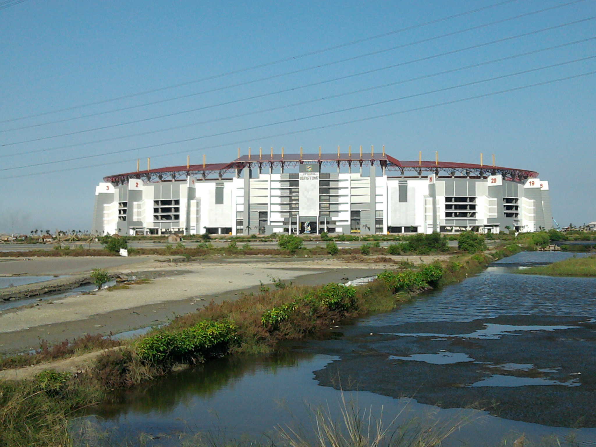 Gelora Bung Tomo